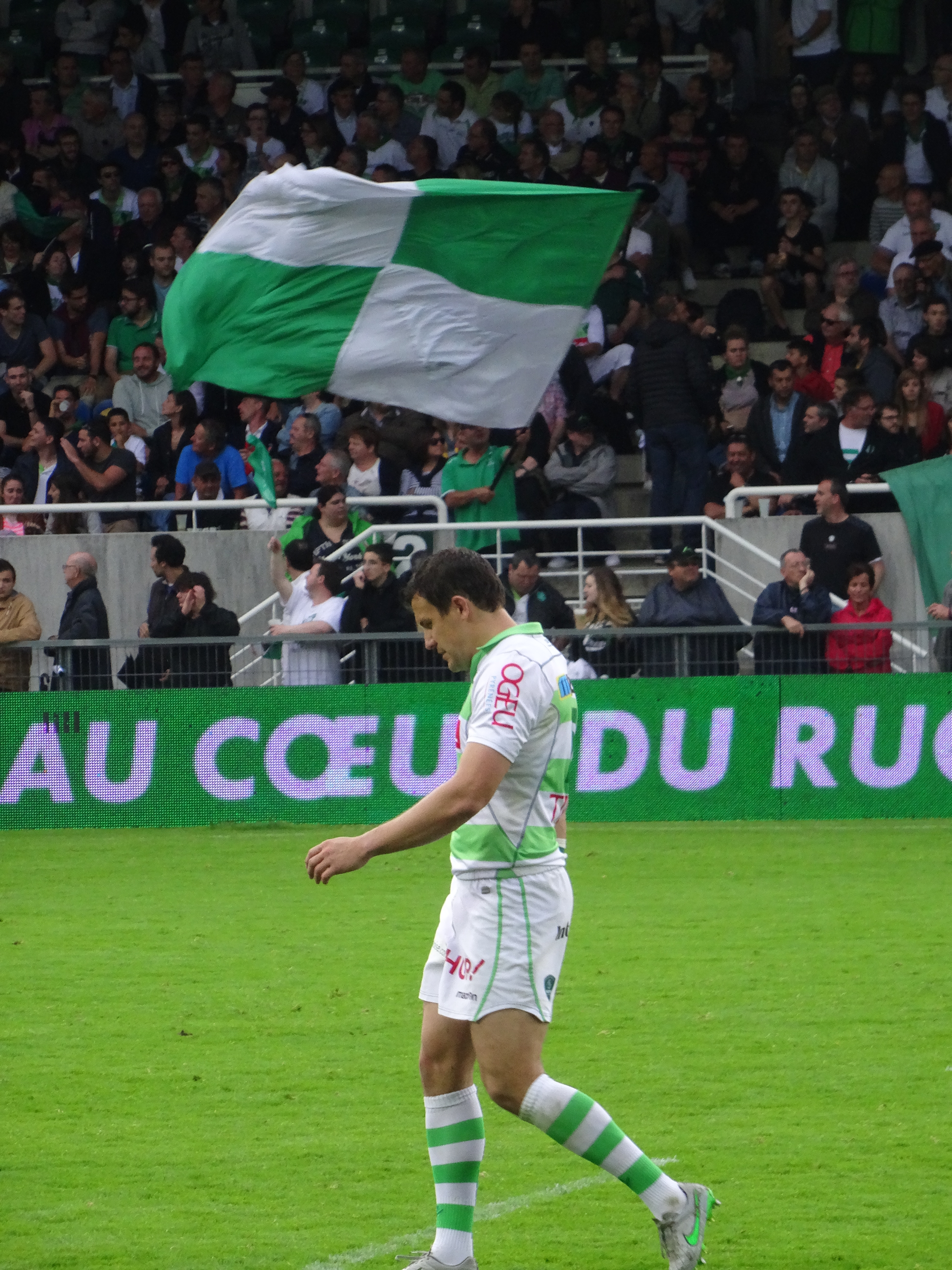 Damien Traille avec la Section paloise (son dernier match, contre Grenoble)